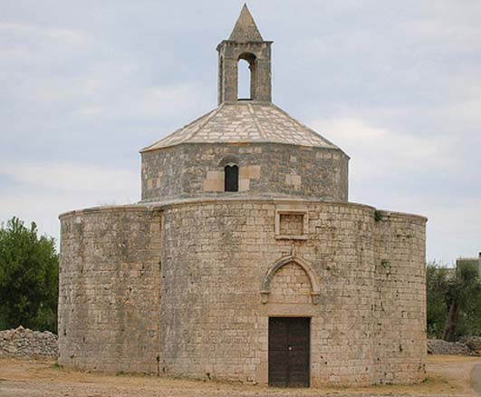 Chiesa di Santa Caterina d'Alessandra, a Conversano